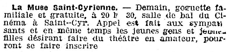 Annonce pour une goguette.